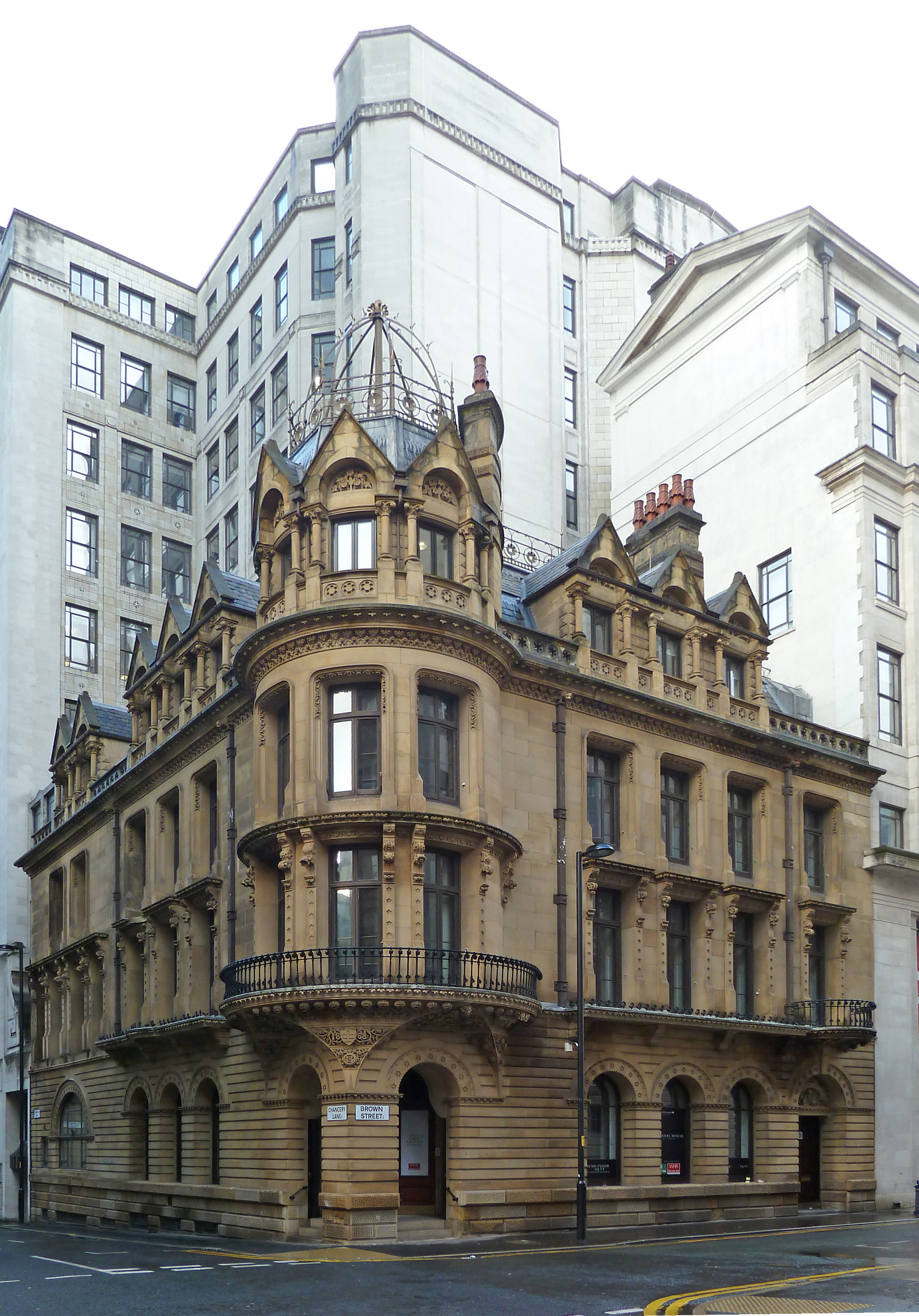 George Truefitt 1868